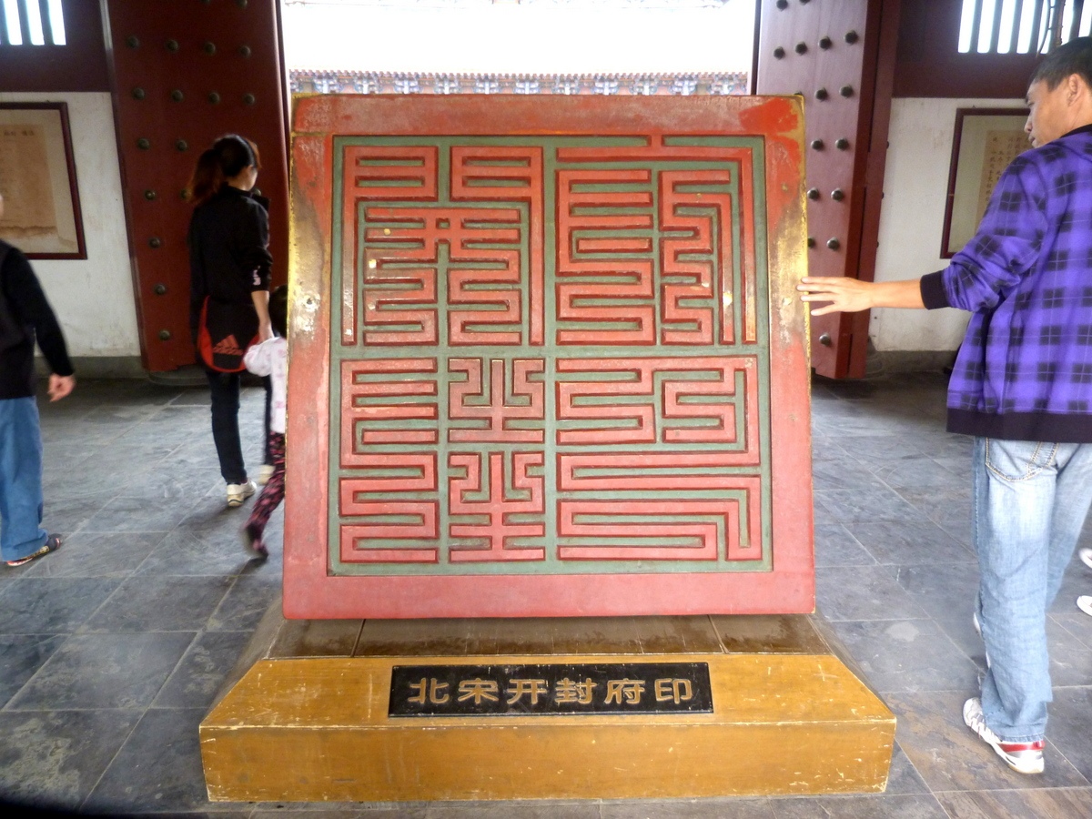 中文（中国大陆）: 北宋开封府印